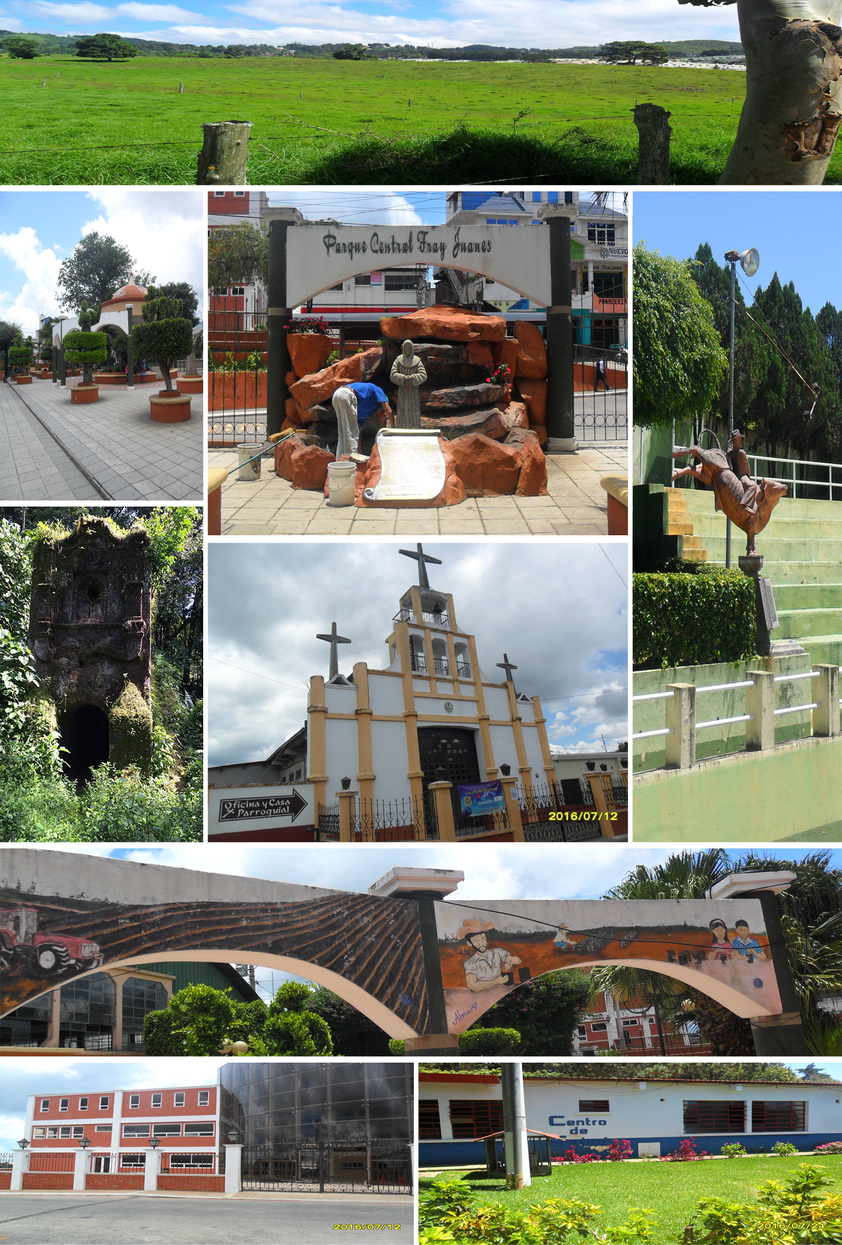 Segundo mosaico Fraijanes